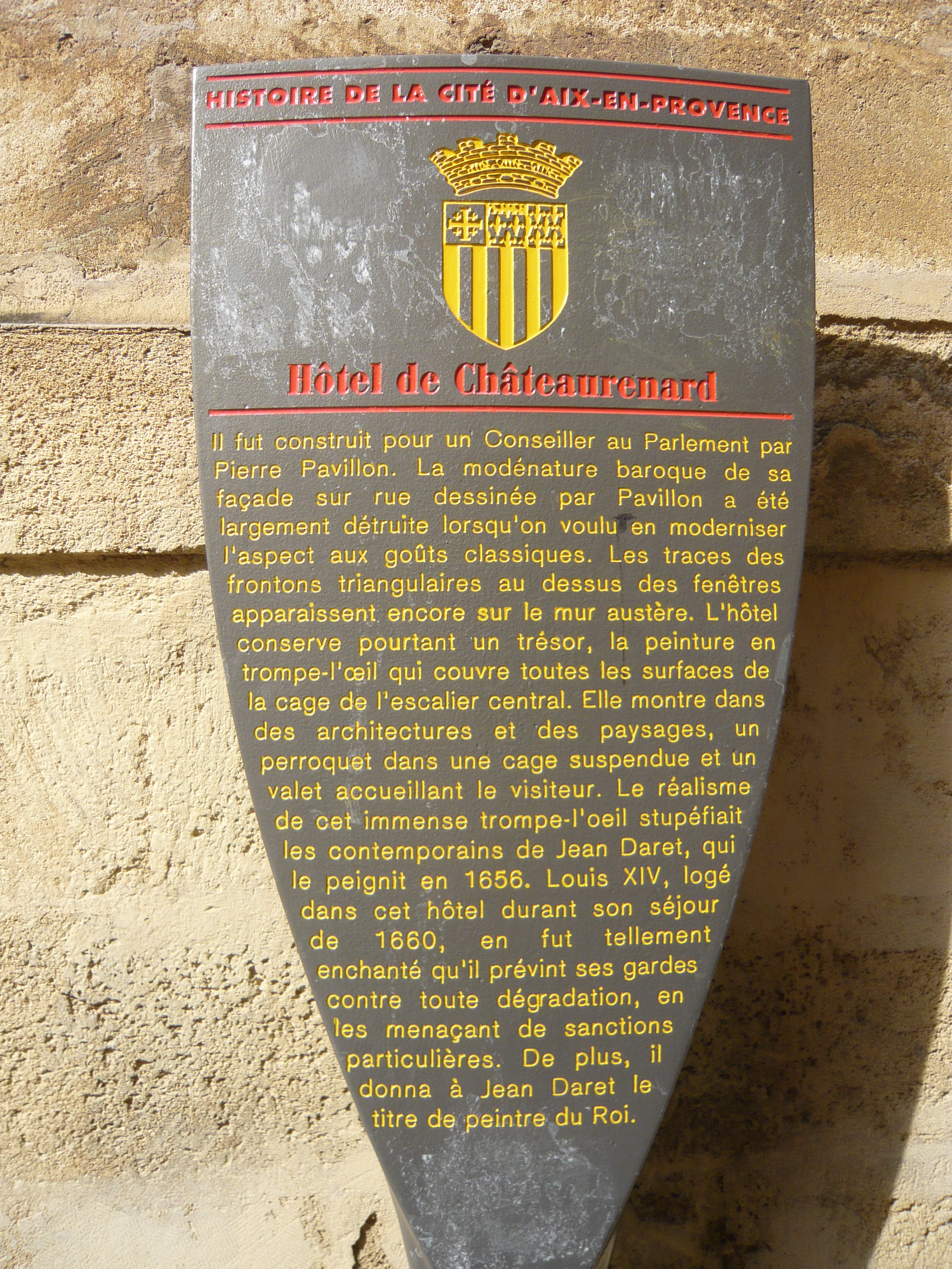 Hôtel de Châteaurenard, 19 rue Gaston de Saporta, Aix-en-Provence (France). Il fut construit pour un Conseiller au Parlement par Pierre Pavillon. La modénature baroque de sa façade sur rue dessinée par Pavillon a été largement détruite lorsqu’on voulut en moderniser l’aspect aux goûts classiques. Les traces des frontons triangulaires au-dessus des fenêtres apparaissent encore sur le mur austère. L’hôtel conserve pourtant un trésor, la peinture en trompe-l’œil qui couvre toutes les surfaces de la cage de l’escalier central. Elle montre dans des architectures et des paysages, un perroquet dans une cage suspendue et un valet accueillant le visiteur. Le réalisme de cet immense trompe-l’œil stupéfait les contemporains de Jean Daret, qui le peignit en 1656. Louis XIV, logé dans cet hôtel durant son séjour de 1660, en fut tellement enchanté qu’il prévint ses gardes contre toute dégradation, en les menaçant de sanctions particulières. De plus, il donna à Jean Daret le titre de peintre du Roi.